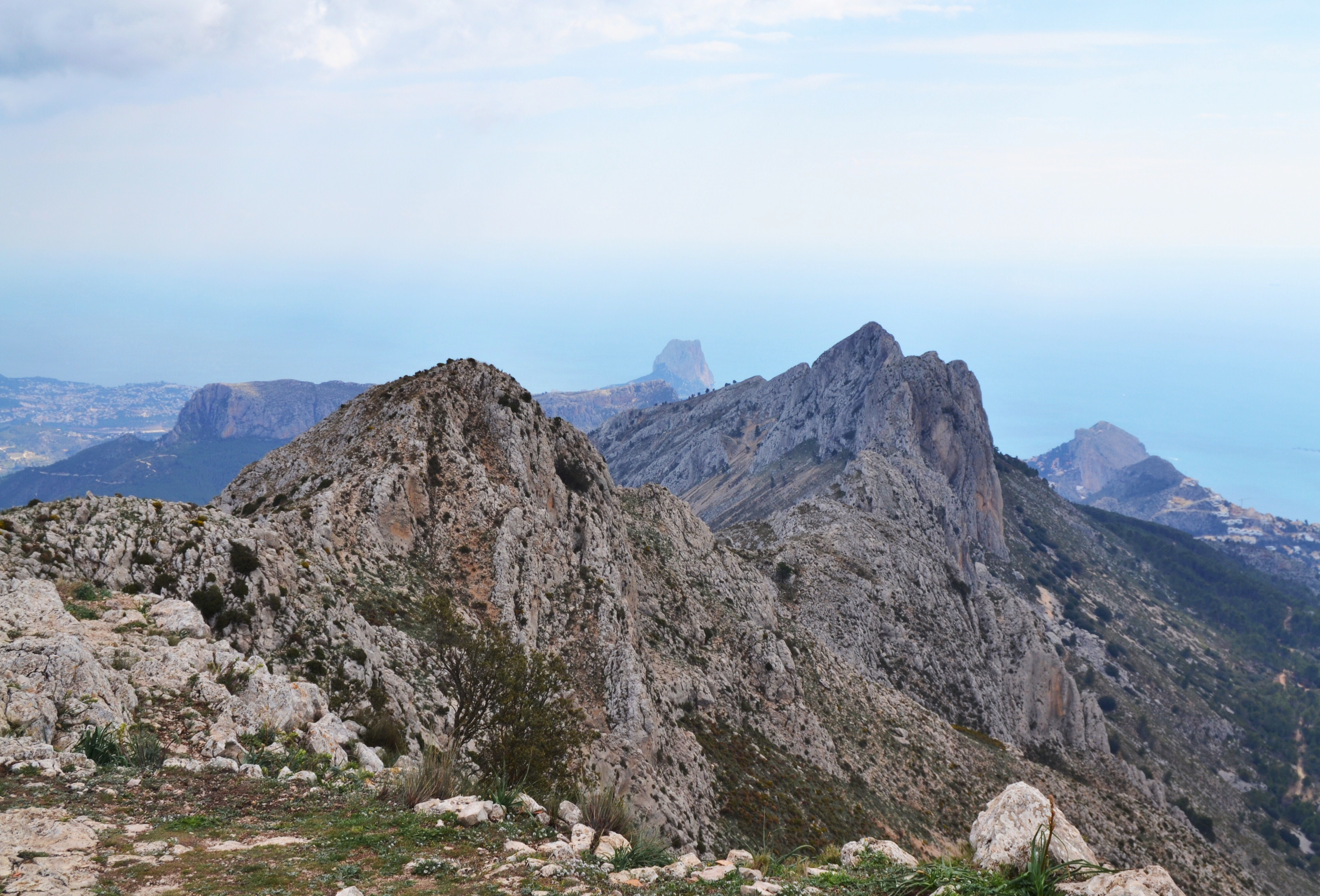 Vista de la serra des del cim, Bèrnia.